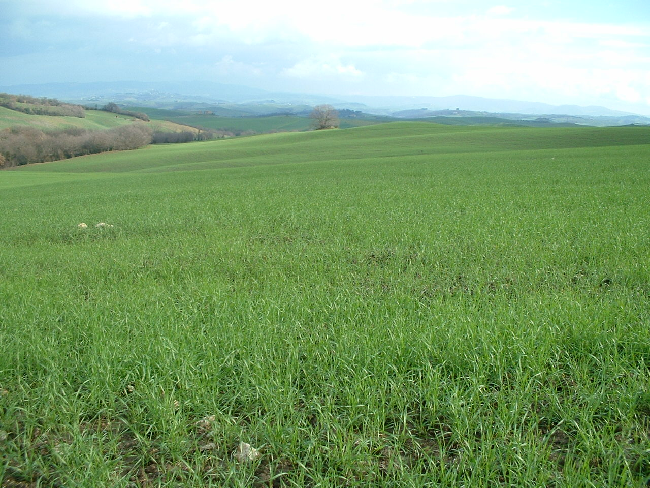 Campo a las afueras de Orciàtico